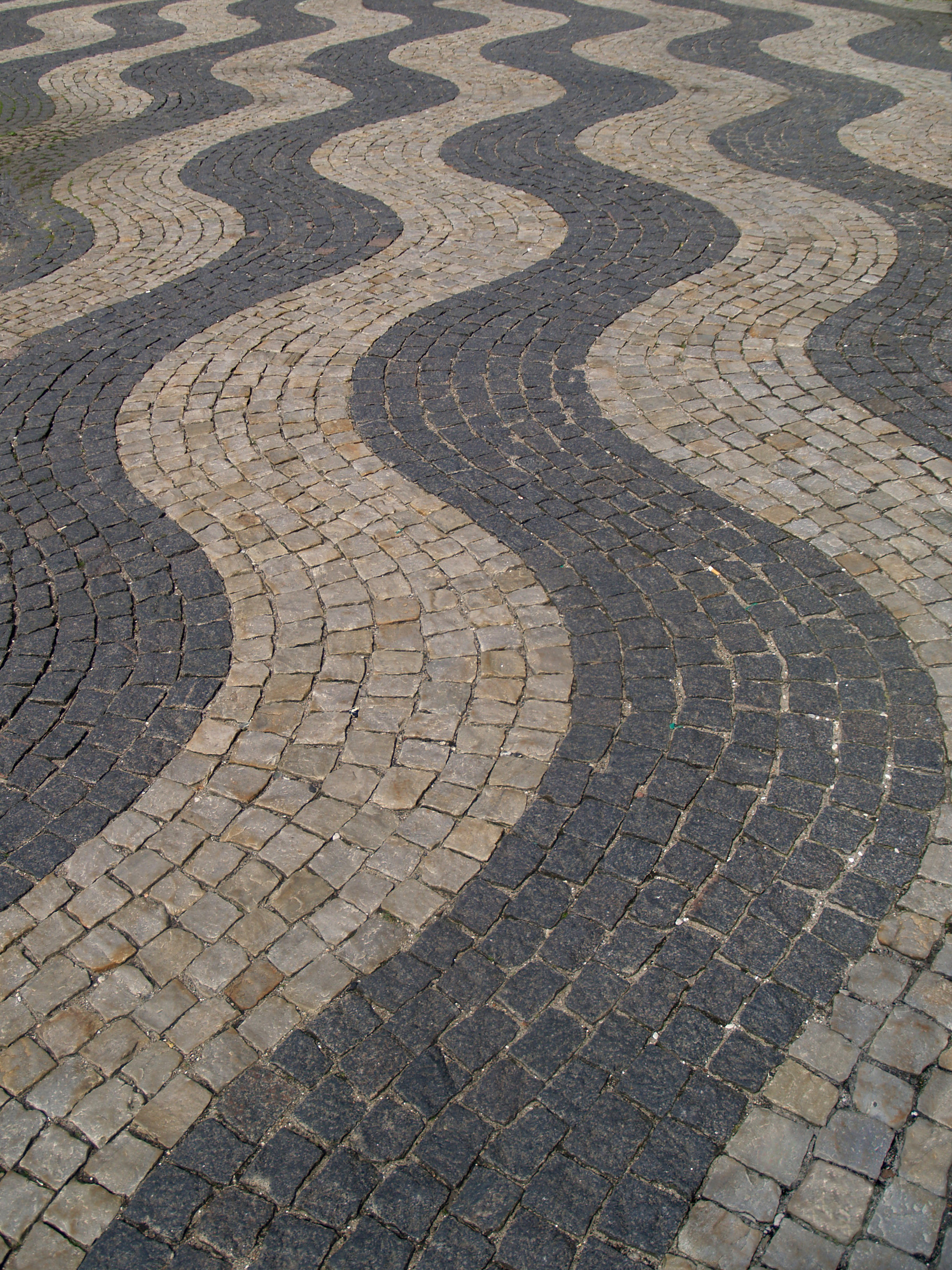 Hack Kampmann's paving at Frederiksberg Domhus (Frederiksberg Courthouse) in the Frederiksberg district of Copenhagen, Denmark